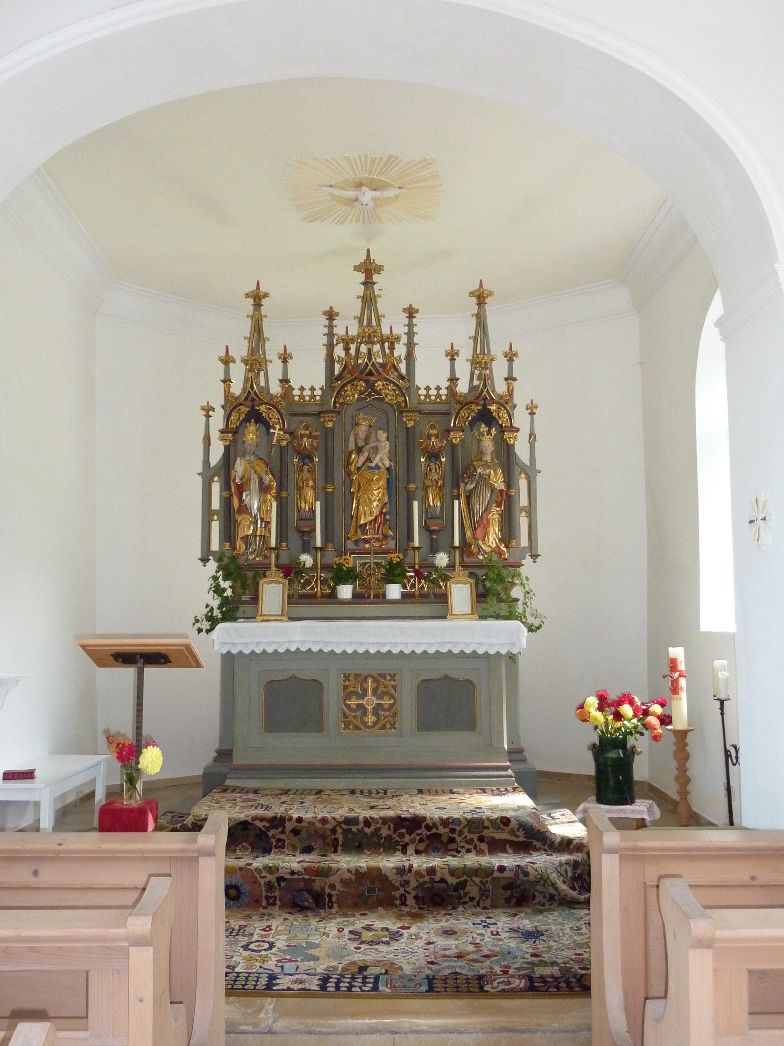 Blick zum Altar der Imberger Kapelle